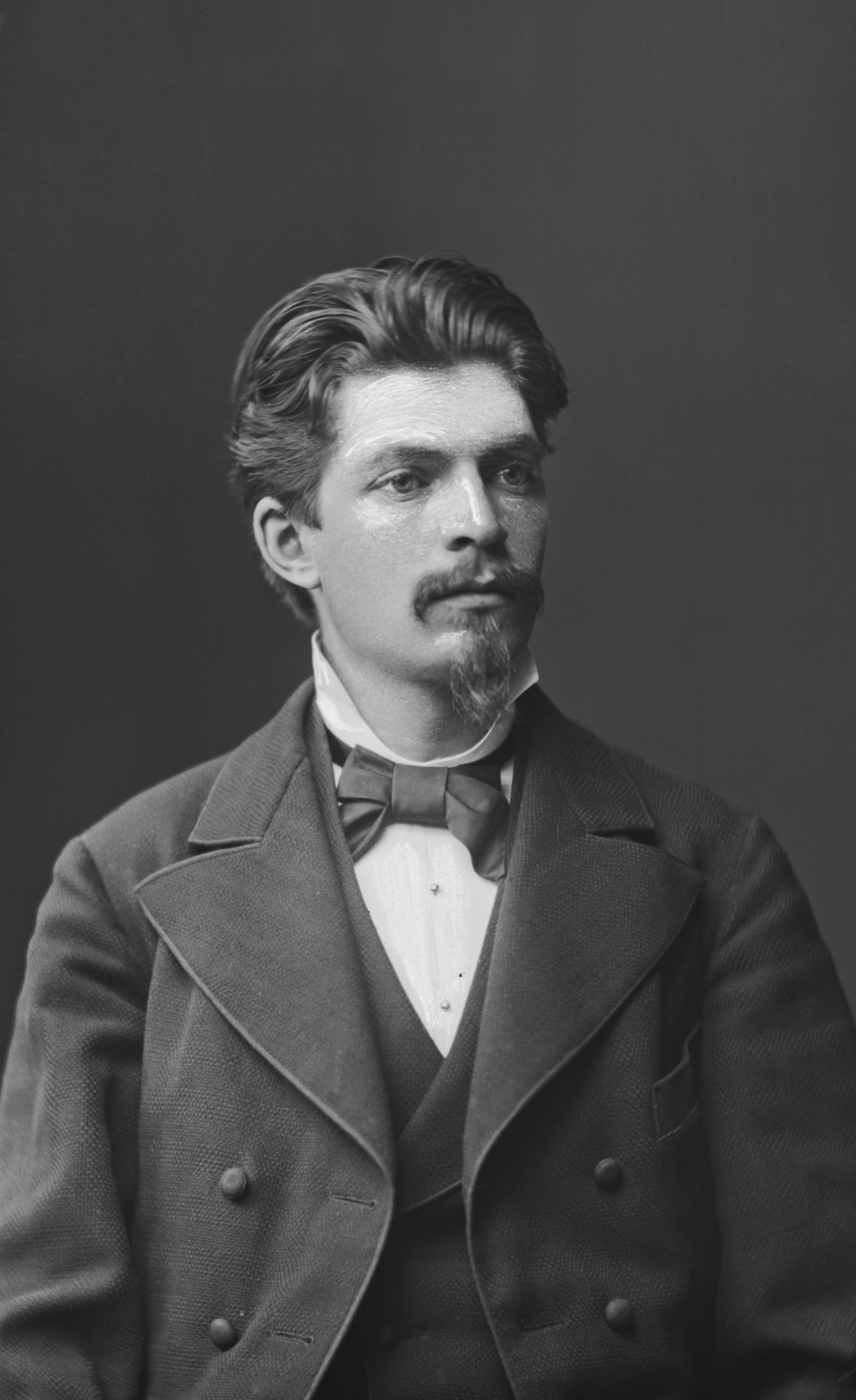 Maisteri Edvard Hjelt, tuleva professori ja valtioneuvos